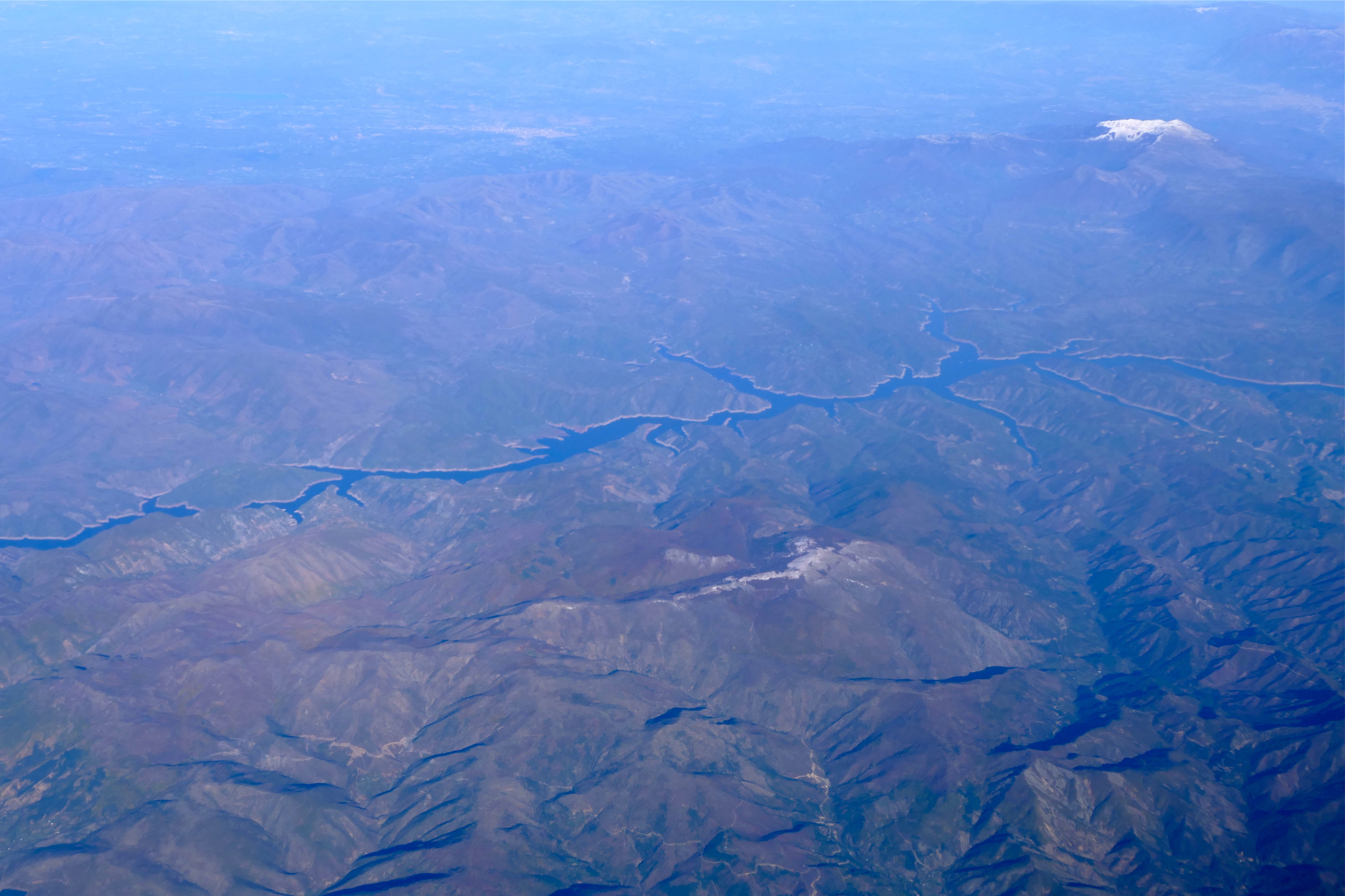 Drini River, ALBANIA